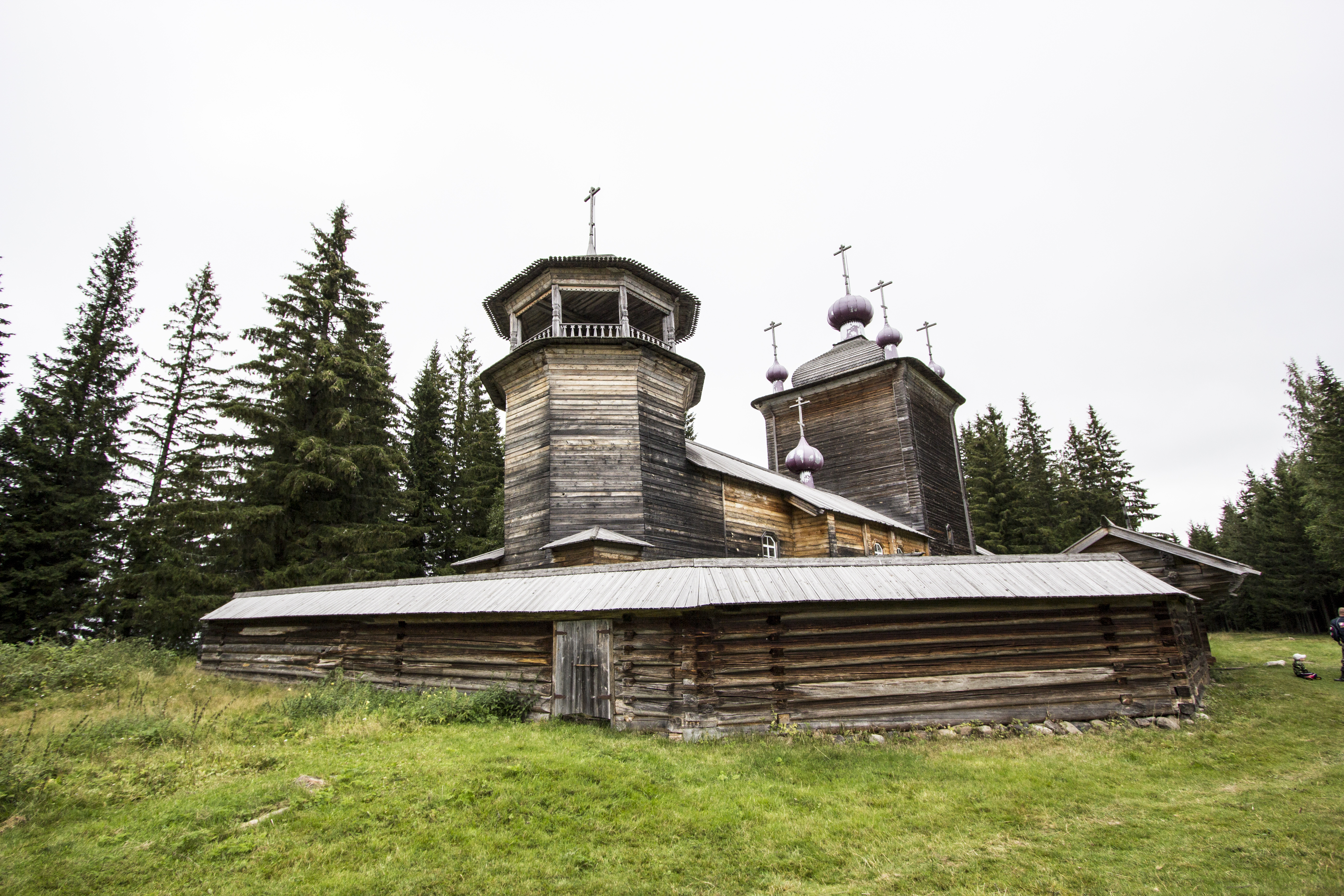 Церковь Ильи Пророка